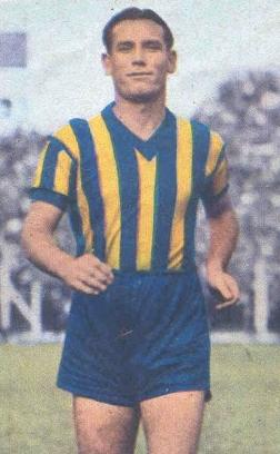 Alfredo Fógel